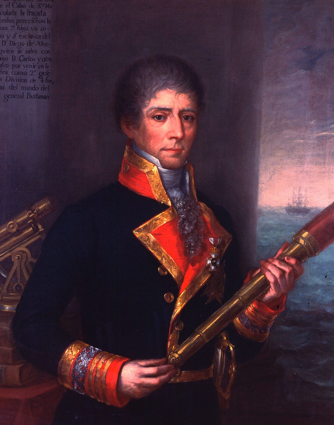 Retrato del marino español Diego de Alvear y Ponce de León (1749-1830), conservado en el Museo Naval de Madrid.